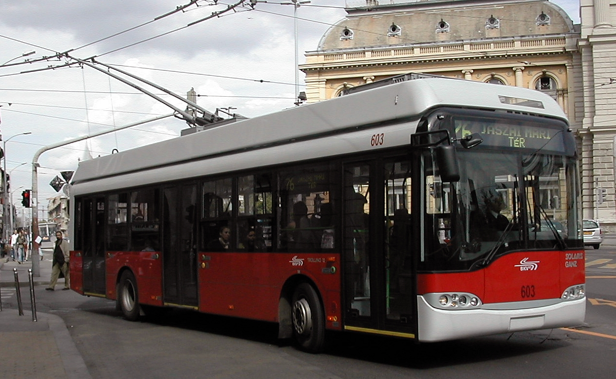 Solaris Ganz Trolleybus in Budapest